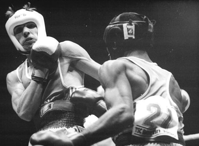 Berlin, TSC-Boxturnier, Andreas Tews, Enrique Carrion ADN-Bernd Settnik 7.10.90 Berlin: 21. Internationales TSC-Boxturnier-Finale im Bantamgewicht-Der 22jährige Europameister von 1987 und dreifache DDR-Meister Andreas Tews (Schweriner BC-l.) holte sich den Turniersieg durch einen klaren 44:18-Punkterfolg über den gleichaltrigen Weltmeister von 1989 und vierfachen Landesmeister von Kuba, Enrique Carrion. Abgebildete Personen: Tews, Andreas: Boxer, SC Traktor Schwerin, Olympiateilnehmer 1988, DDR